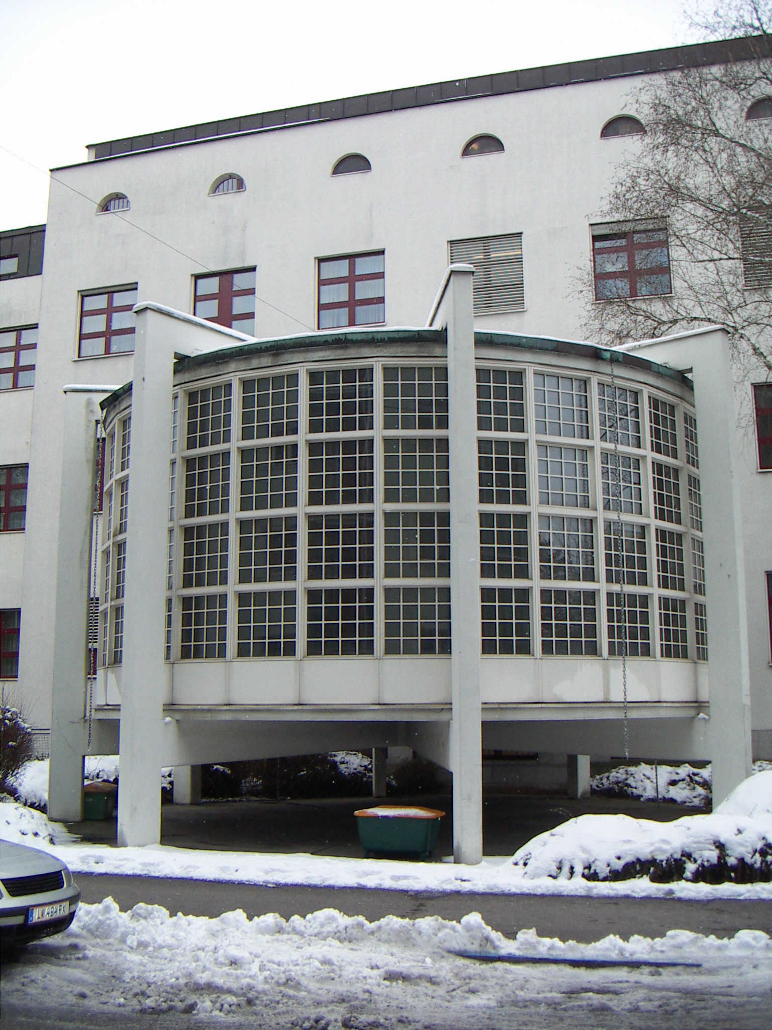 Diakonissenkrankenhaus Linz, Anbau Kapelle, Zugang über das Erdgeschoss im Krankenhaus